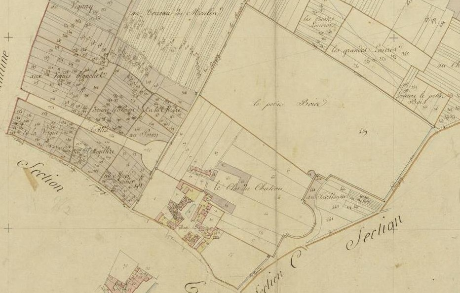 Extrait du cadastre de Perrigny-lès-Dijon (centré)